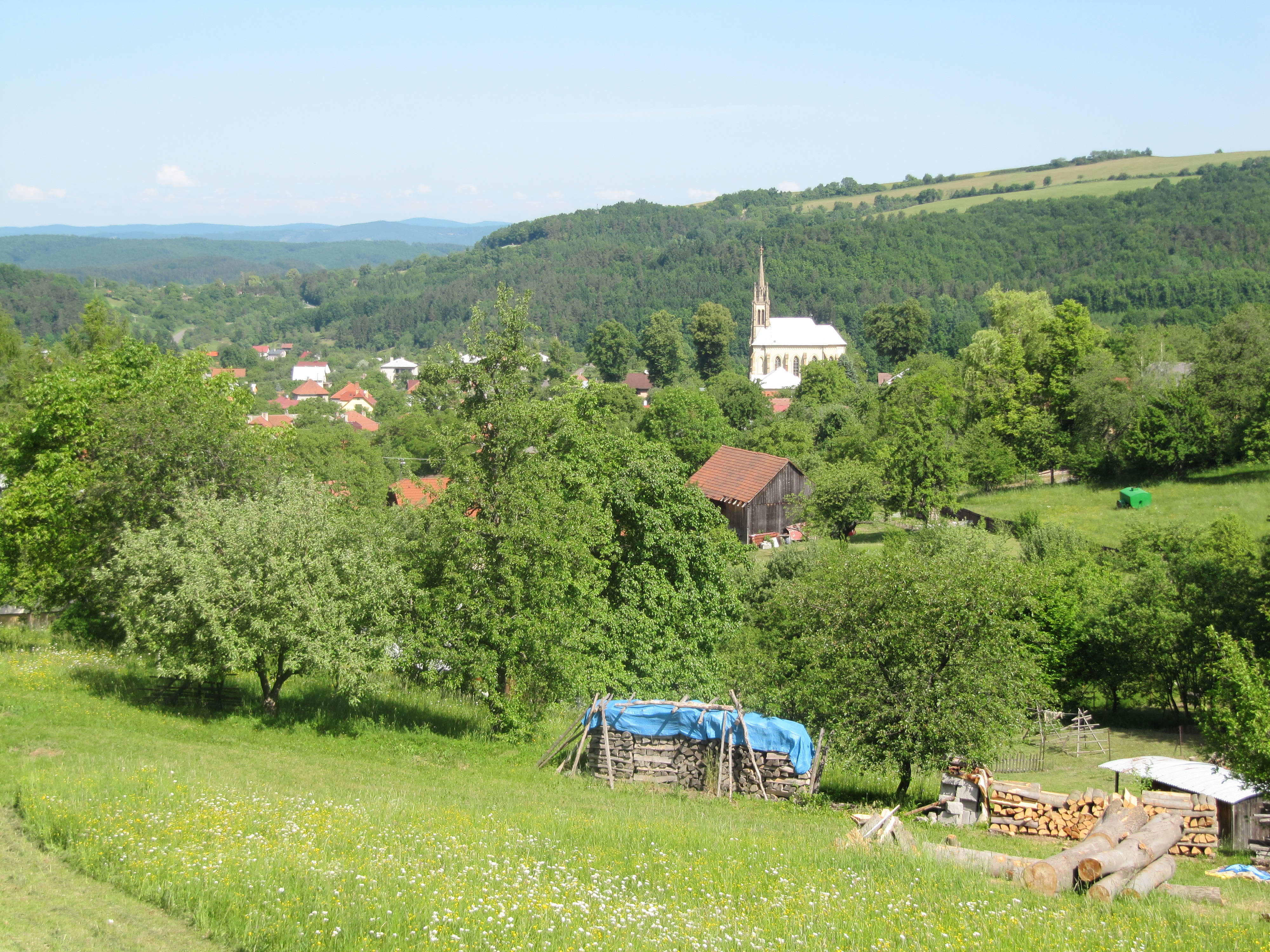 Bratřejov